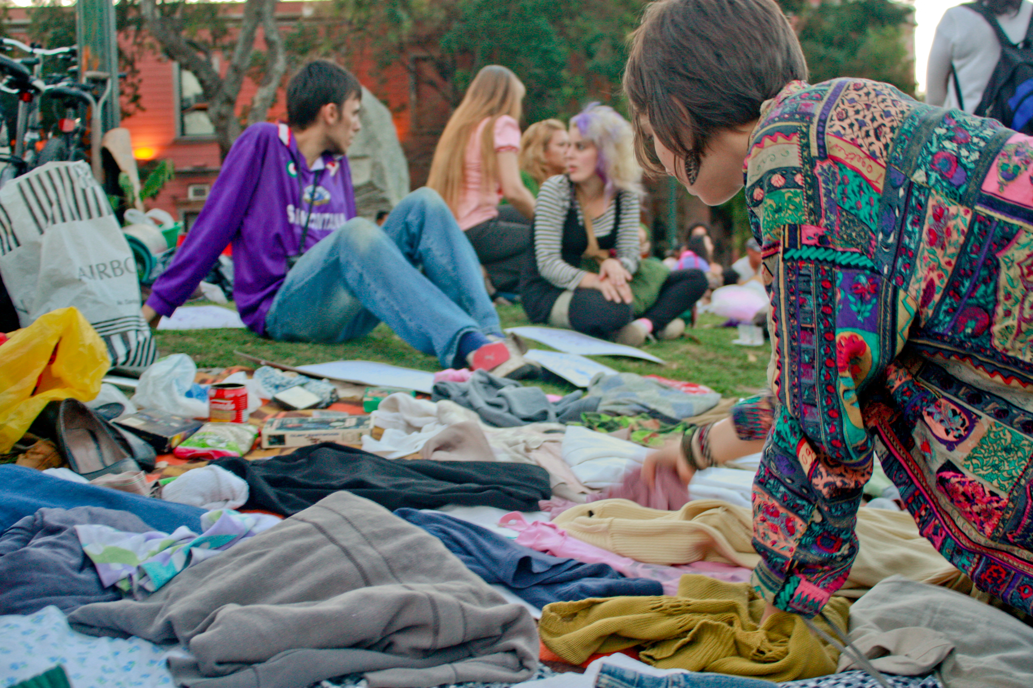 Una chica busca ropa de su gusto en una Gratiferia